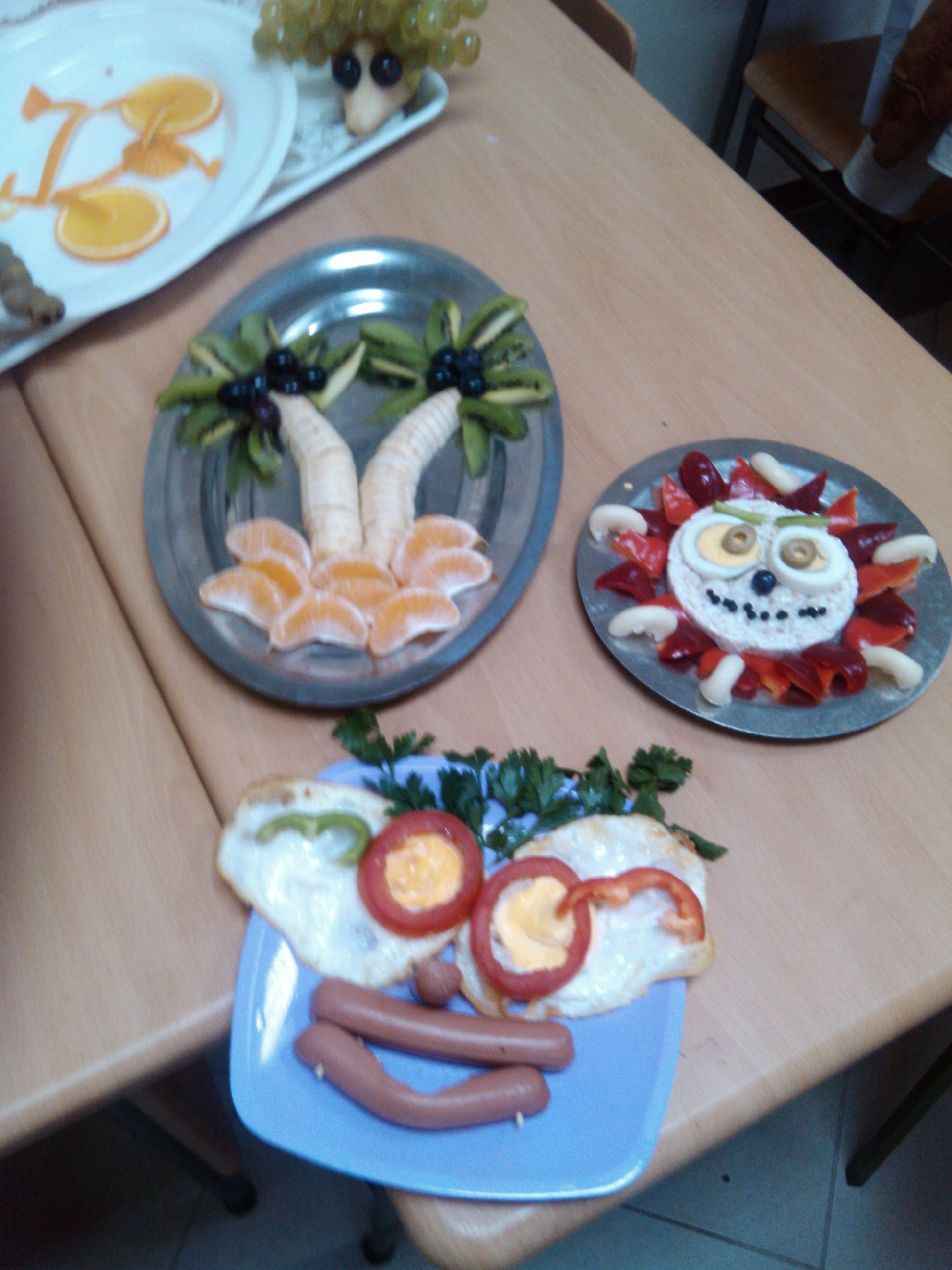 Zanimljiva slika hrane